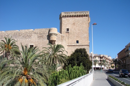 Palau d' Altamira, Elche